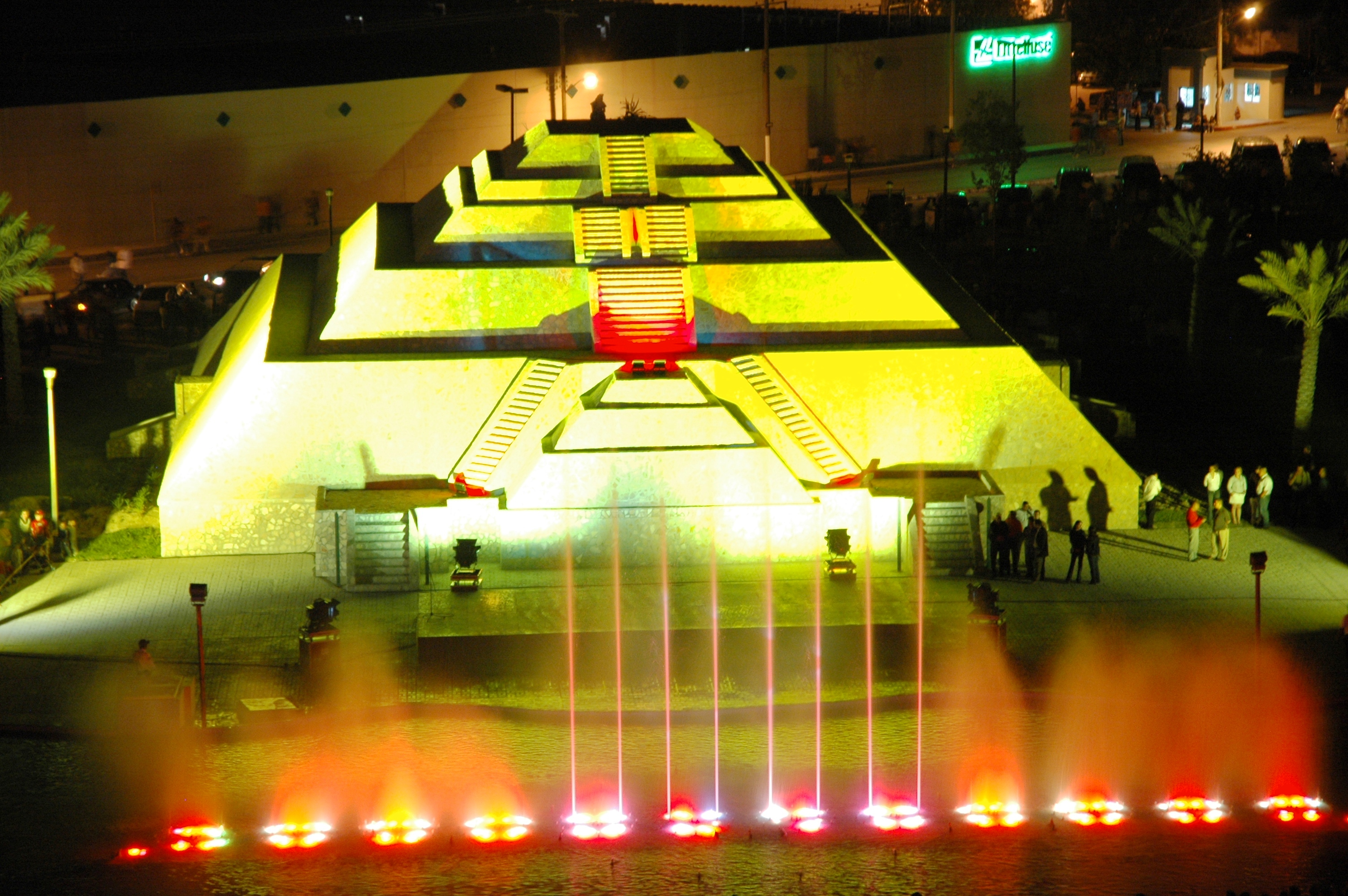 Plaza de las Culturas, Piedras Negras, Coahuila